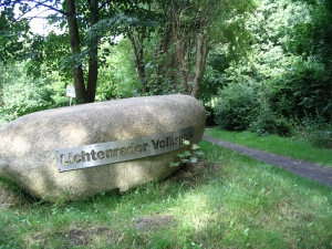 Lichtenrader Volkspark